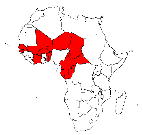 Länder mit an den Euro gebundenen Währungen in Afrika, selbst erstellt (EBB, 11.03.2005)